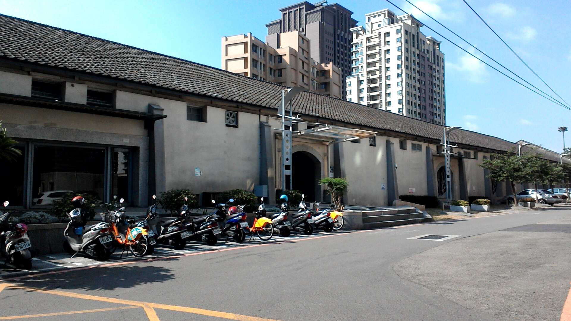 新竹市鐵道藝術村,台灣省新竹市東區東勢聯里東園里